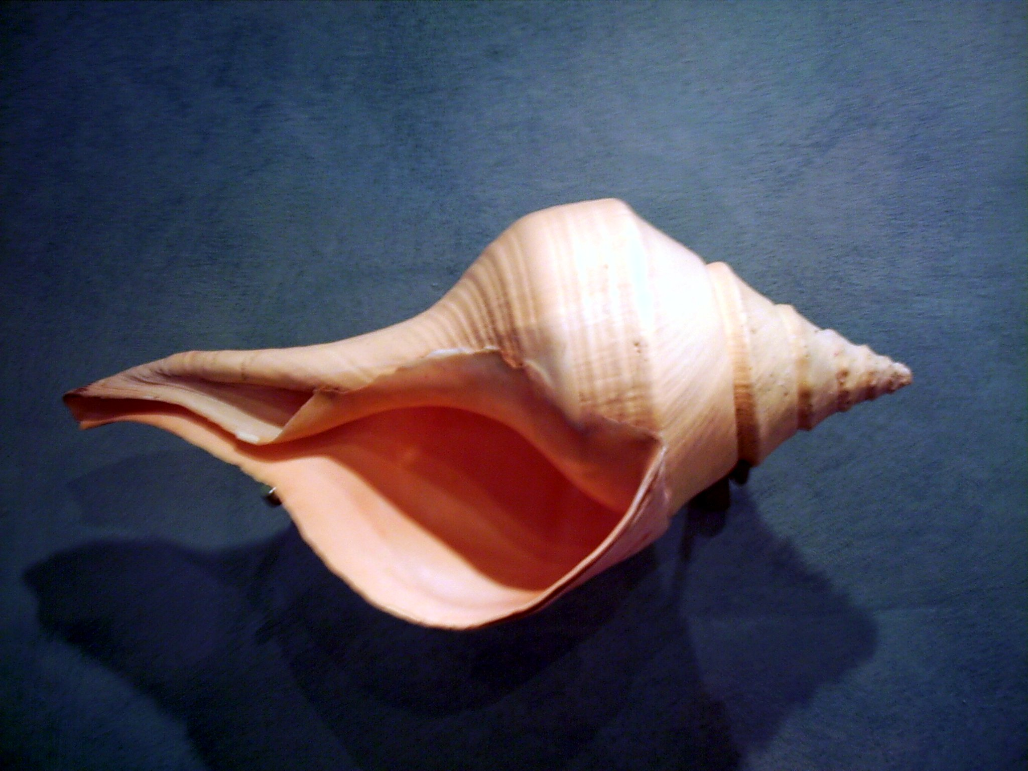 Syrinx aruanus, syn. Megalatractus aruanus Linnaeus, conquilla, al Museu del Cau del Cargol, a Vilassar de Dalt, al Maresme, (Catalunya).